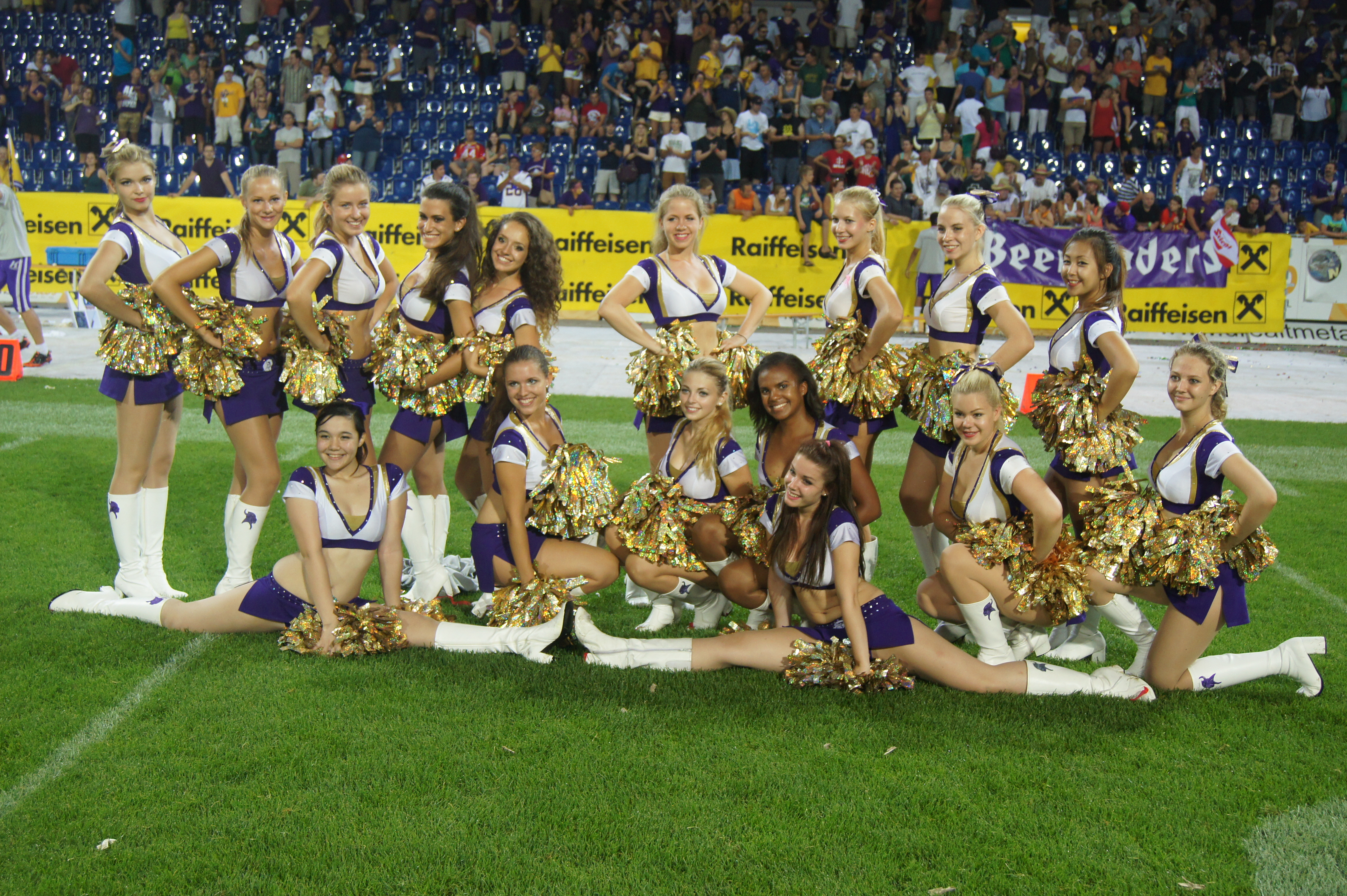 Austrian Bowl XXIX in der NV Arena in St. Pölten